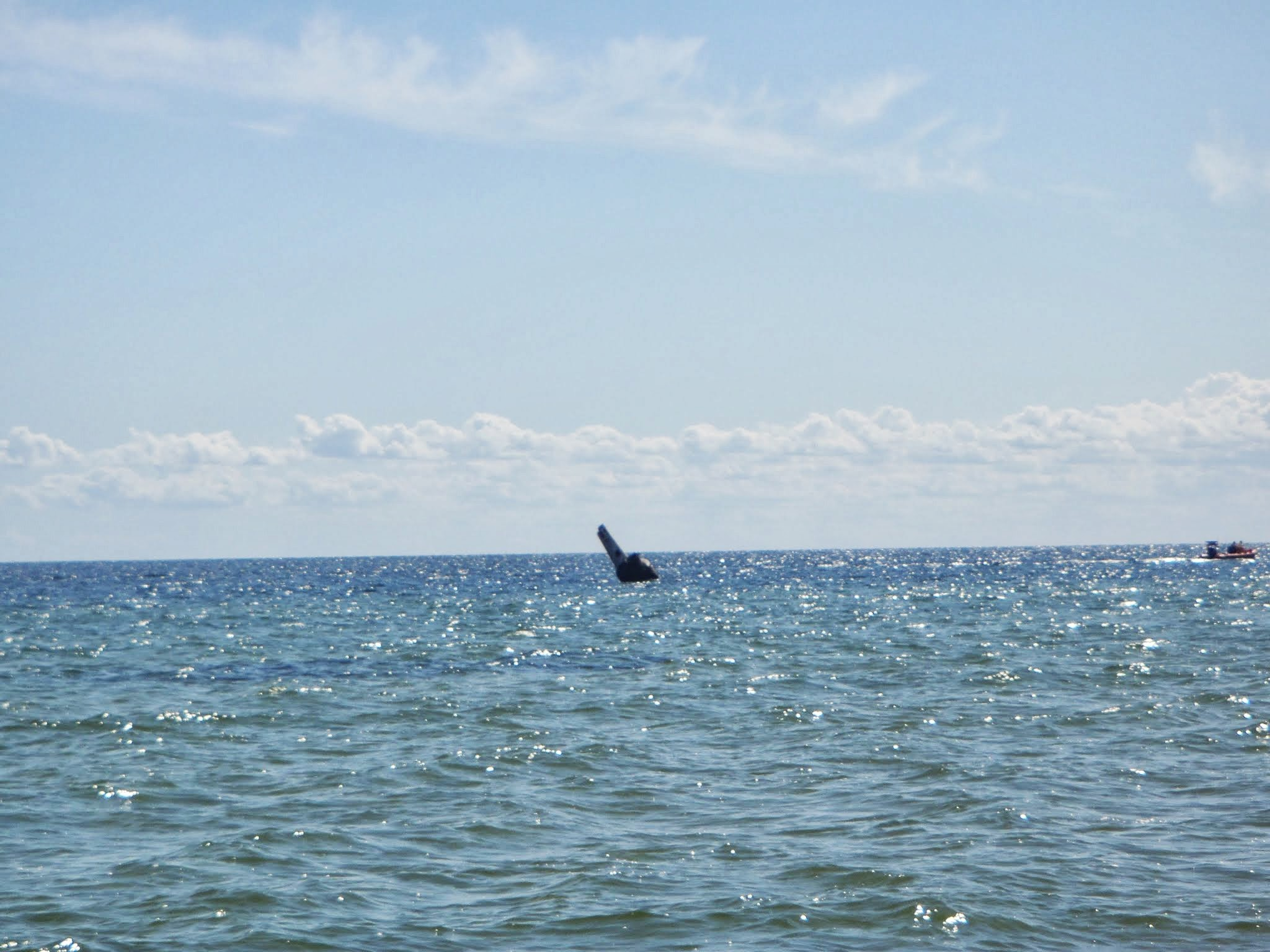 wrak ORP "Kujawiak"